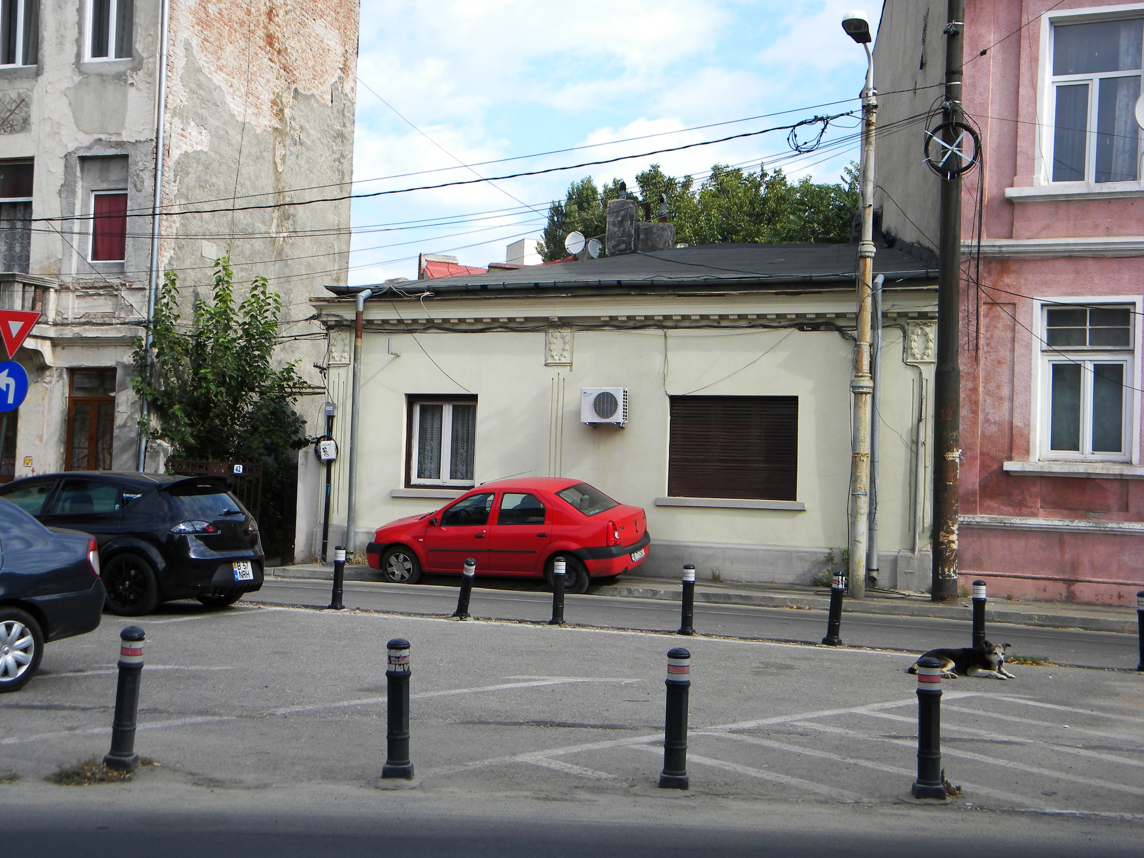 Bucuresti, Romania, Casa pe Calea Grivitei nr. 42 sect. 1